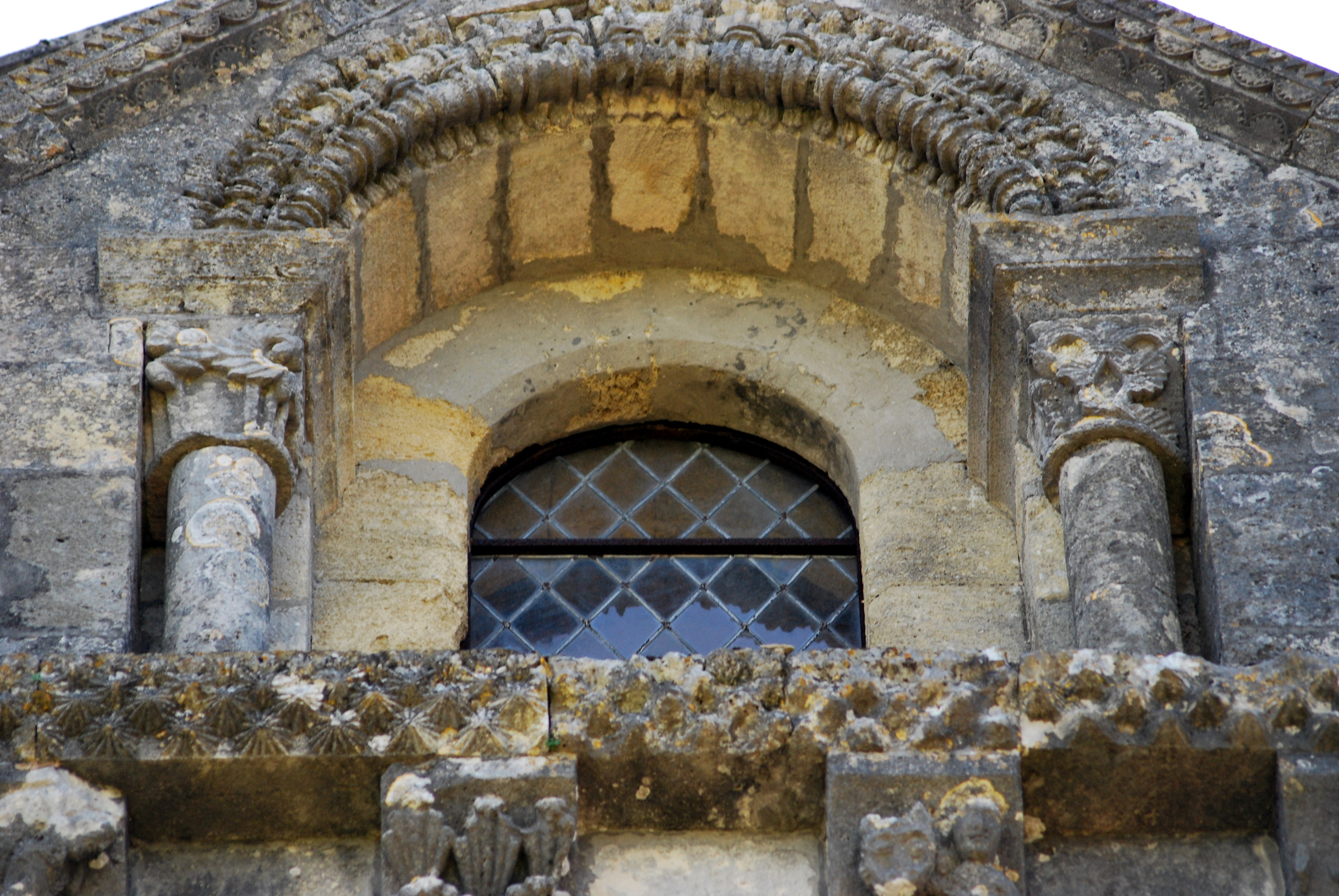 Loupiac église Saint Pierre